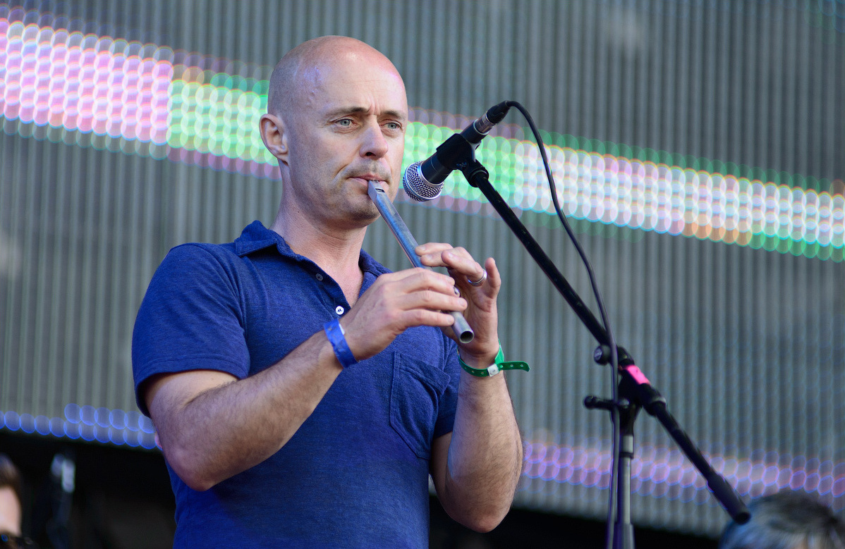 Брайан Финнеган, группа "Аквариум", фестиваль "Рок над Волгой" 2013